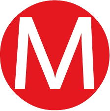 大阪市営地下鉄御堂筋線路線記号